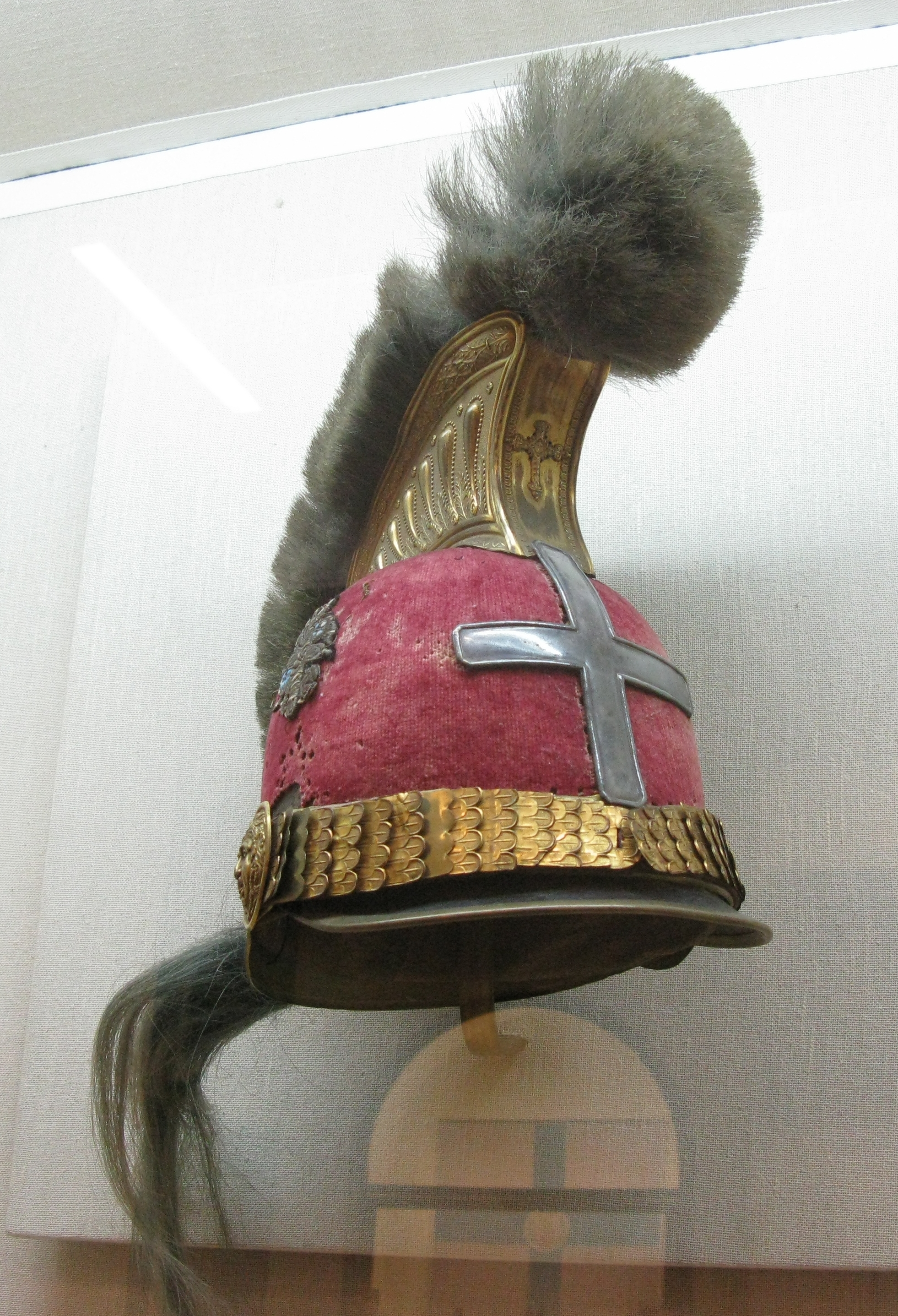 Kolokotronis obtained this helmet when he served in the English army. He added the cross himself. Located at the National Historical Museum, Athens, Greece. --- Ο Κολοκοτρώνης απέκτησε το κράνος όταν υπηρετούσε στον Αγγλικό στρατό. Στη συνέχεια πρόσθεσε μόνος του τον σταυρό. Προσωπικά αντικείμενα του Θ. Κολοκοτρώνη. Εθνικό Ιστορικό Μουσείο. Αθήνα.